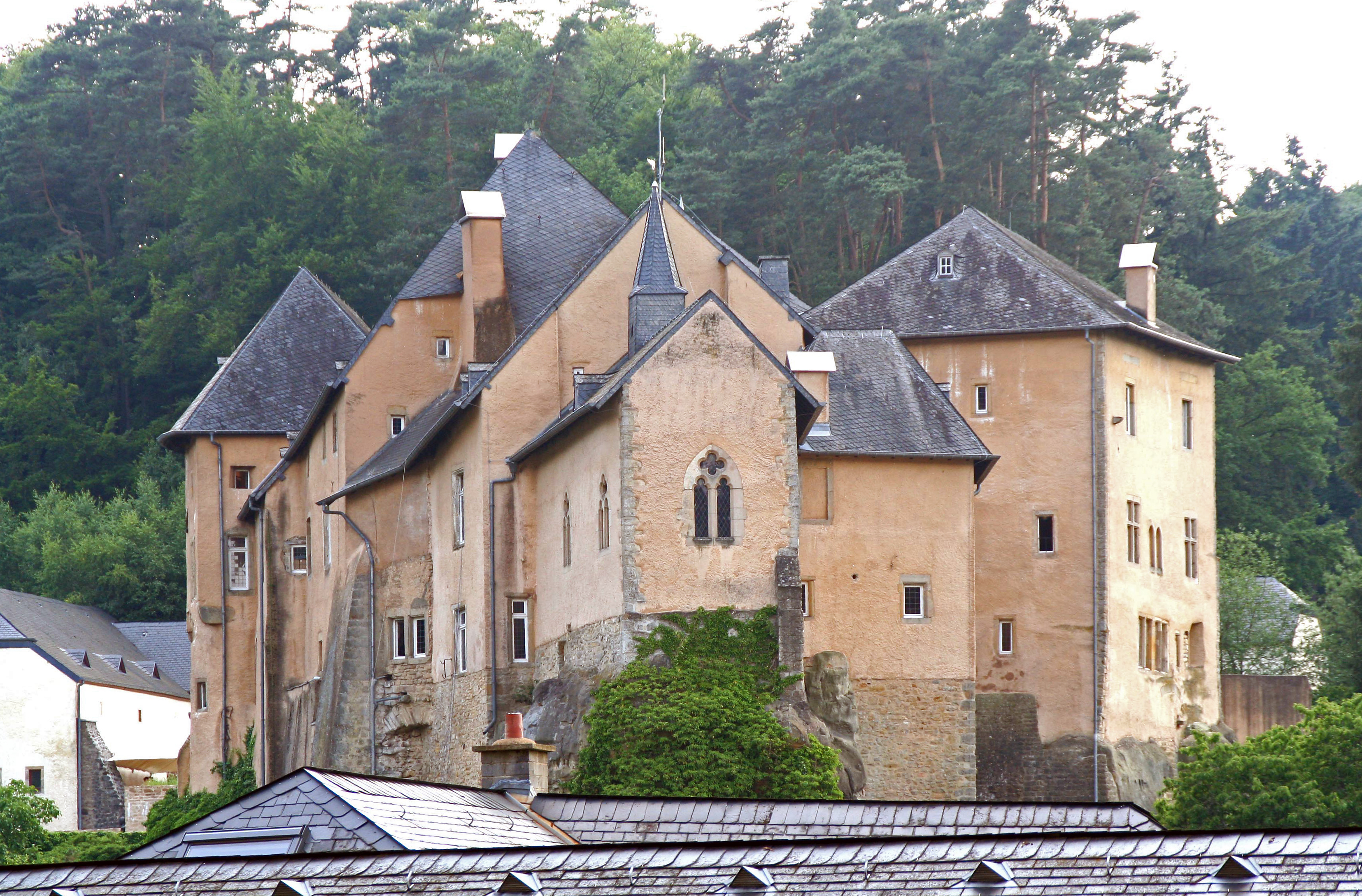 Buerglënster.